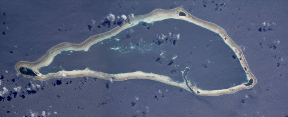 Atoll Sapwuahfik (früher Ngatik) mit der Hauptinsel Ngatik im Westen